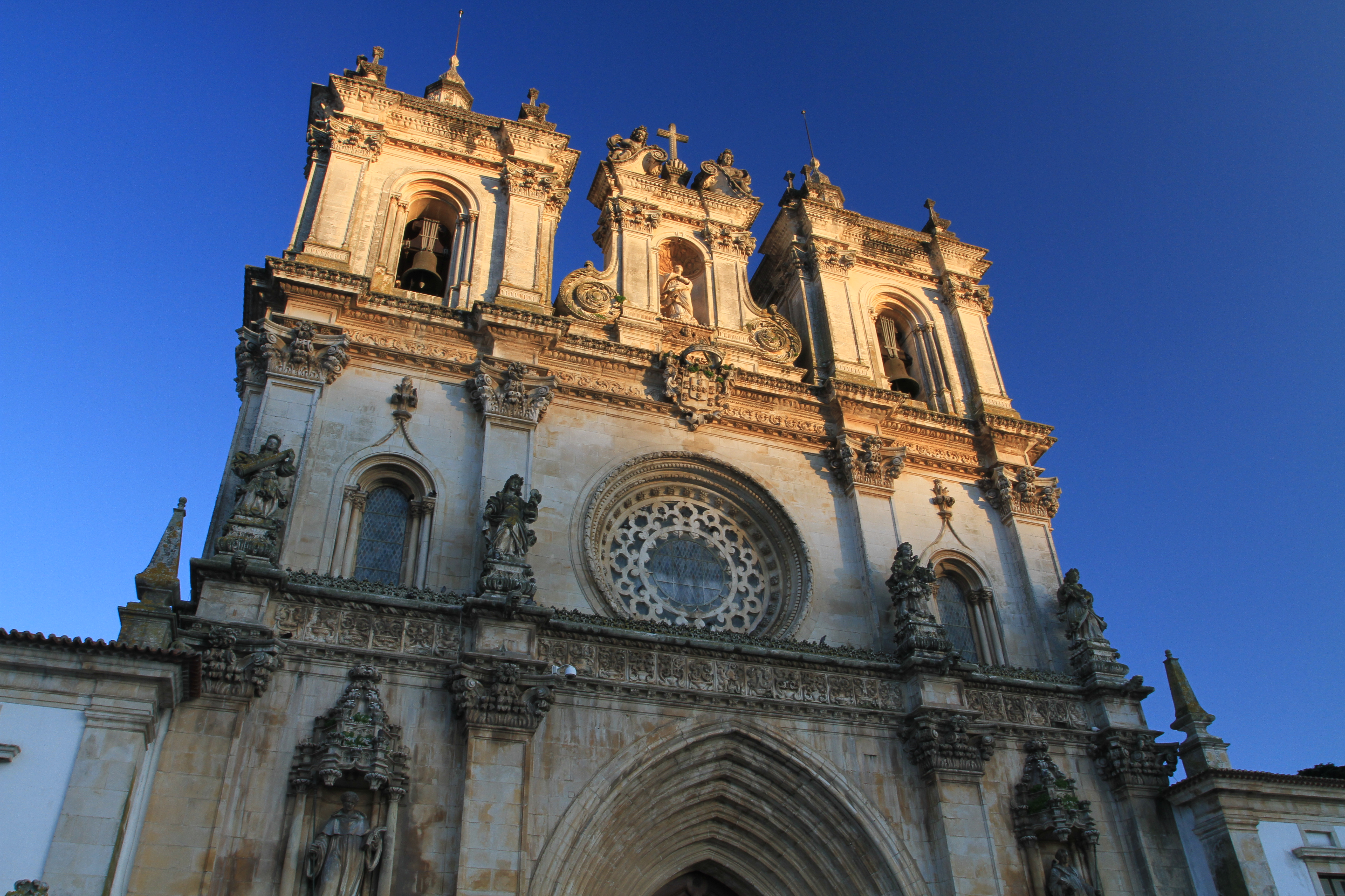 Mosteiro de Alcobaça This file was uploaded for Wiki Loves Monuments in Portugal with the unique identifier 70185.